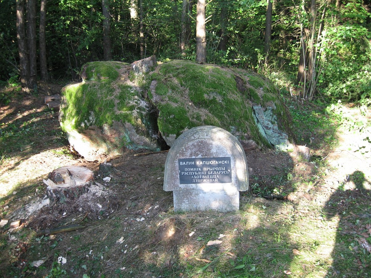 Ладыга. Капцюганскі валун